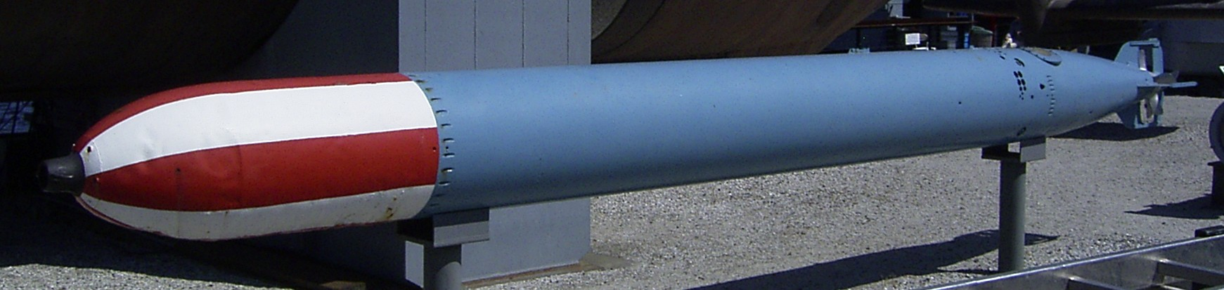 G7a Übungstorpedo wie er bei der Bundesmarine noch im Einsatz war. Ausgestellt im deutschen Marinemuseum Wilhelmshaven.